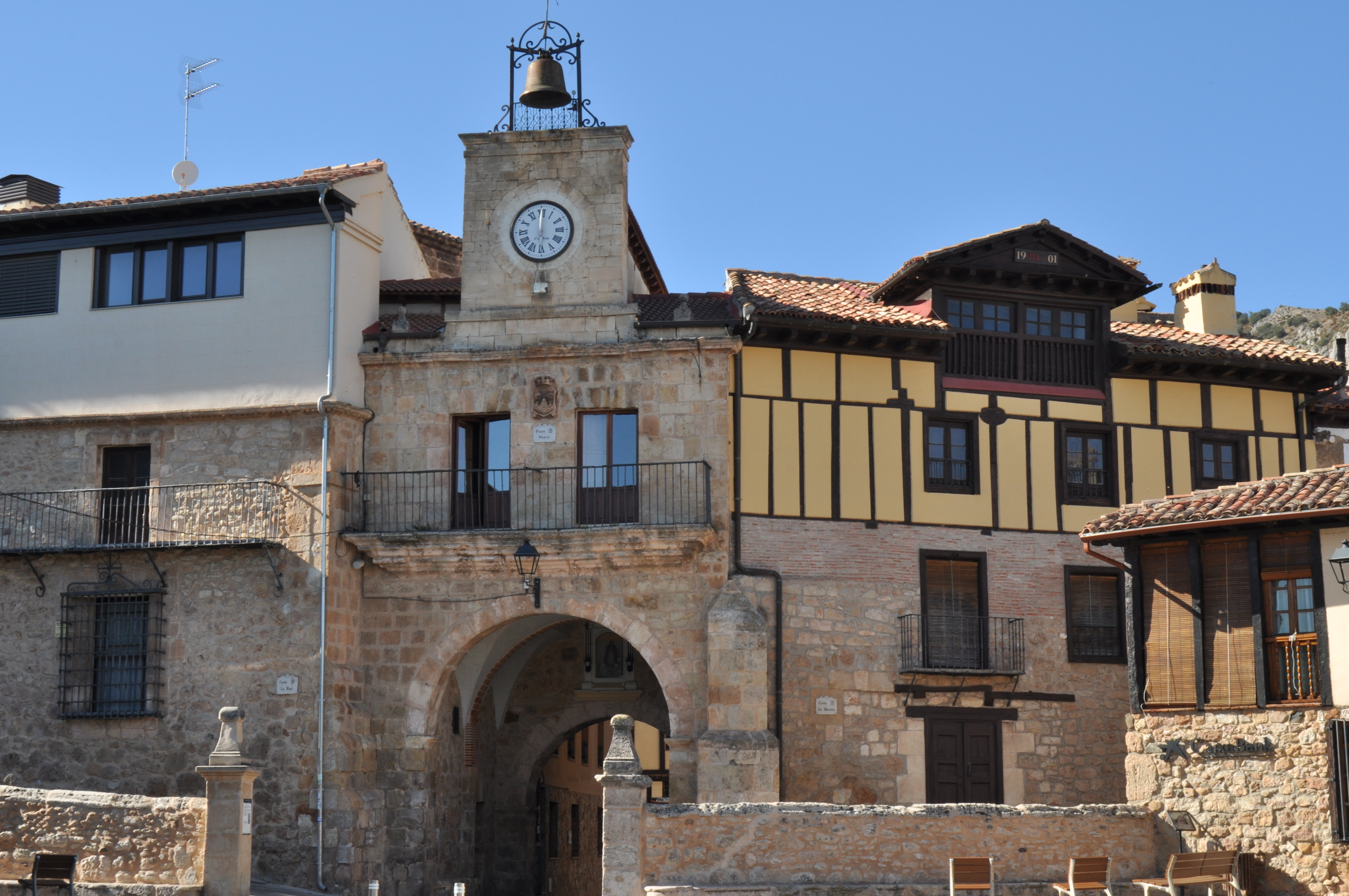 Poza de la Sal - 004